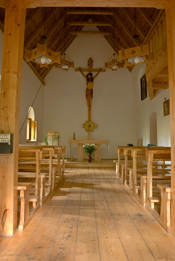 Wnętrze kaplicy w pustelni Braci Albertynów na Kalatówkach w Tatrach